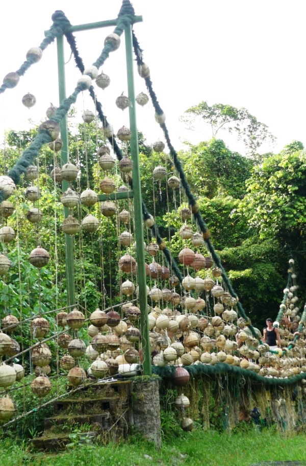 Isla del Coco, puente sobre el Río Genio, construido con desechos de decomisos a pesqueros ilegales, hecho por el artista "Pancho" ante la necesidad de un puente en una vista suya a la Isla.